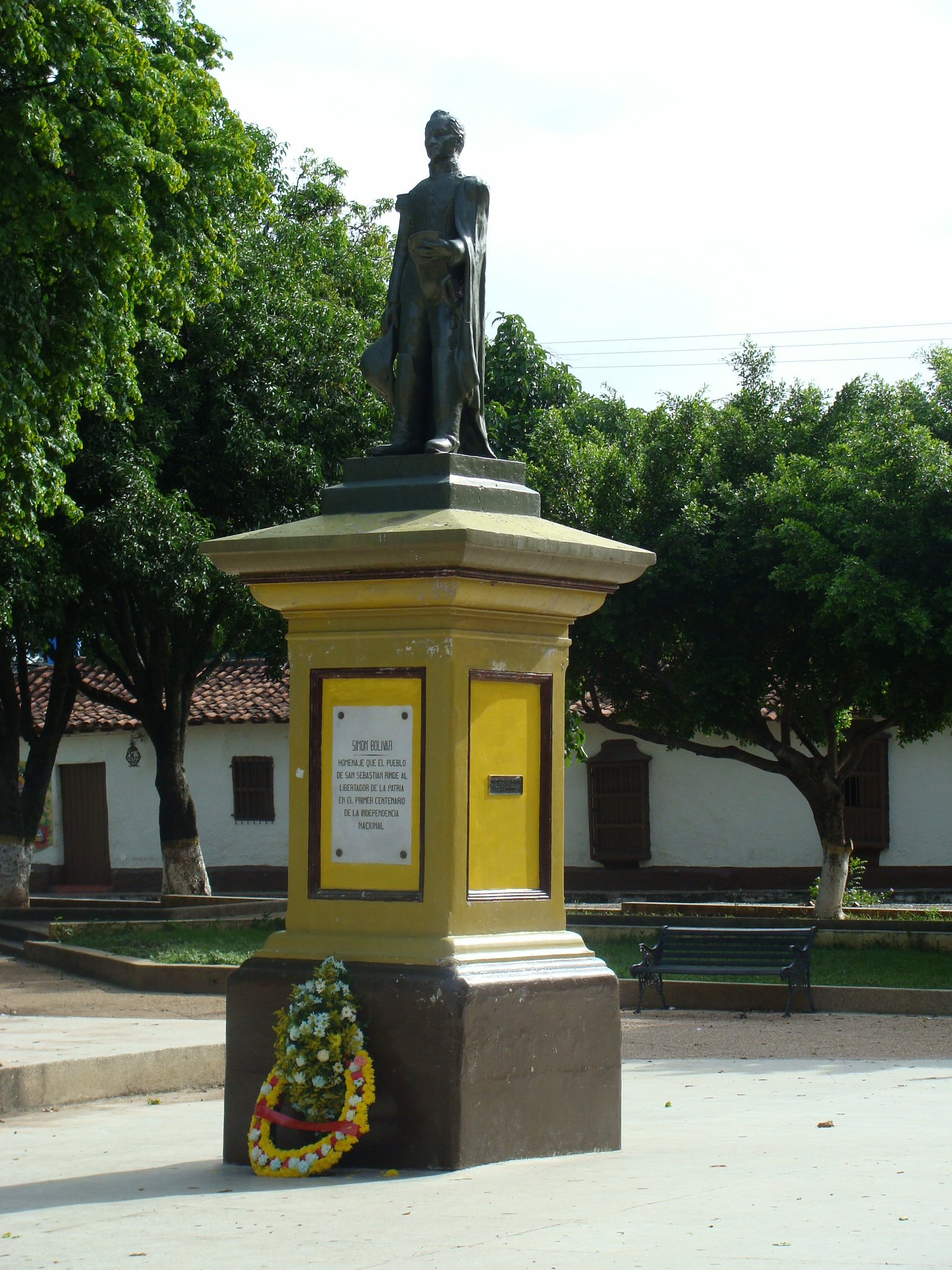 Plaza Bolívar de San Sebastián de Los Reyes (Venezuela). Es la antigua Plaza Mayor de la ciudad colonial